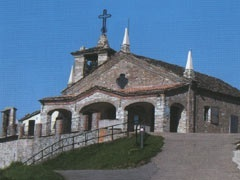 opera propria,stampa,Santuario della Madonna del Monte Penice,licenza libera